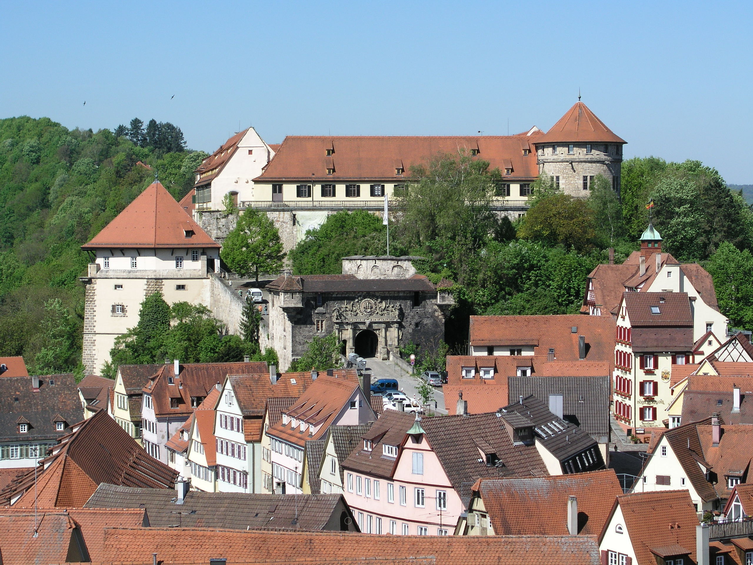 Schloss Hohentübingen, mit dem Schlossportal, gesehen vom Turm der Tübinger Stiftskirche.